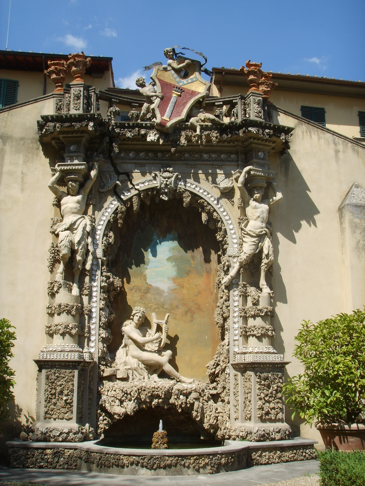 see description